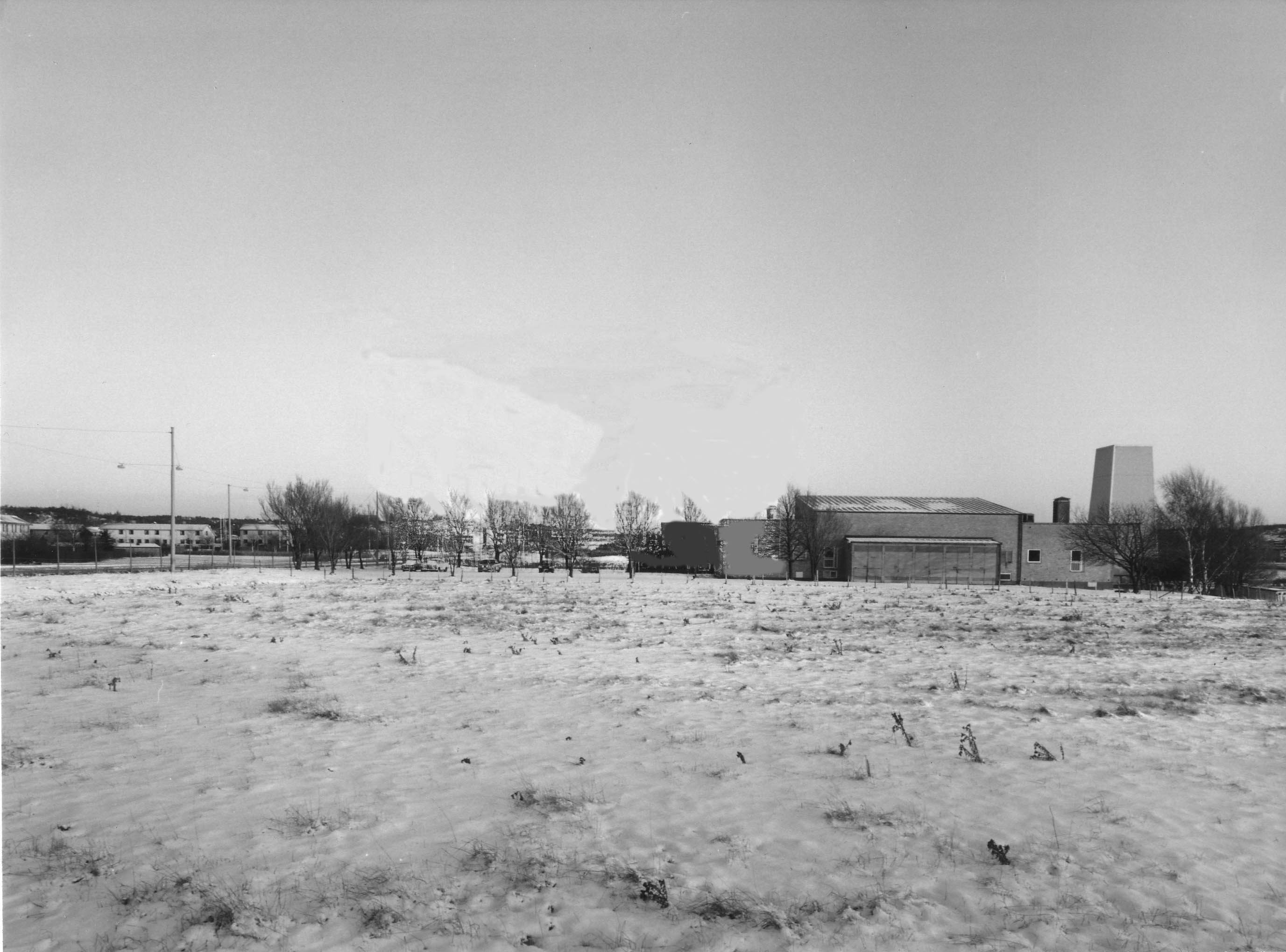 Sändarstationen på håll.